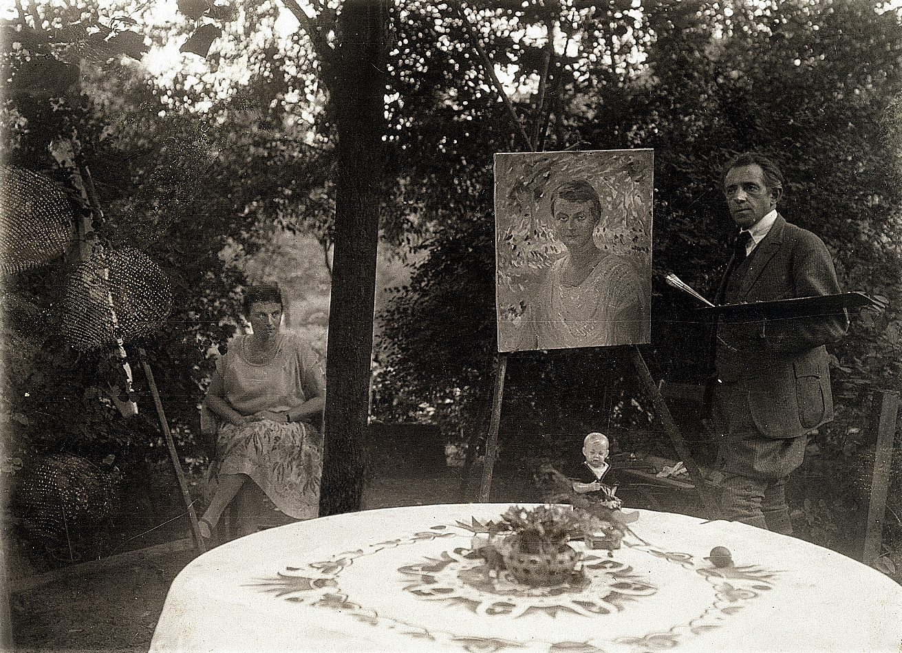 Jurij Hajna (1877–1952) moluje Elisabeth